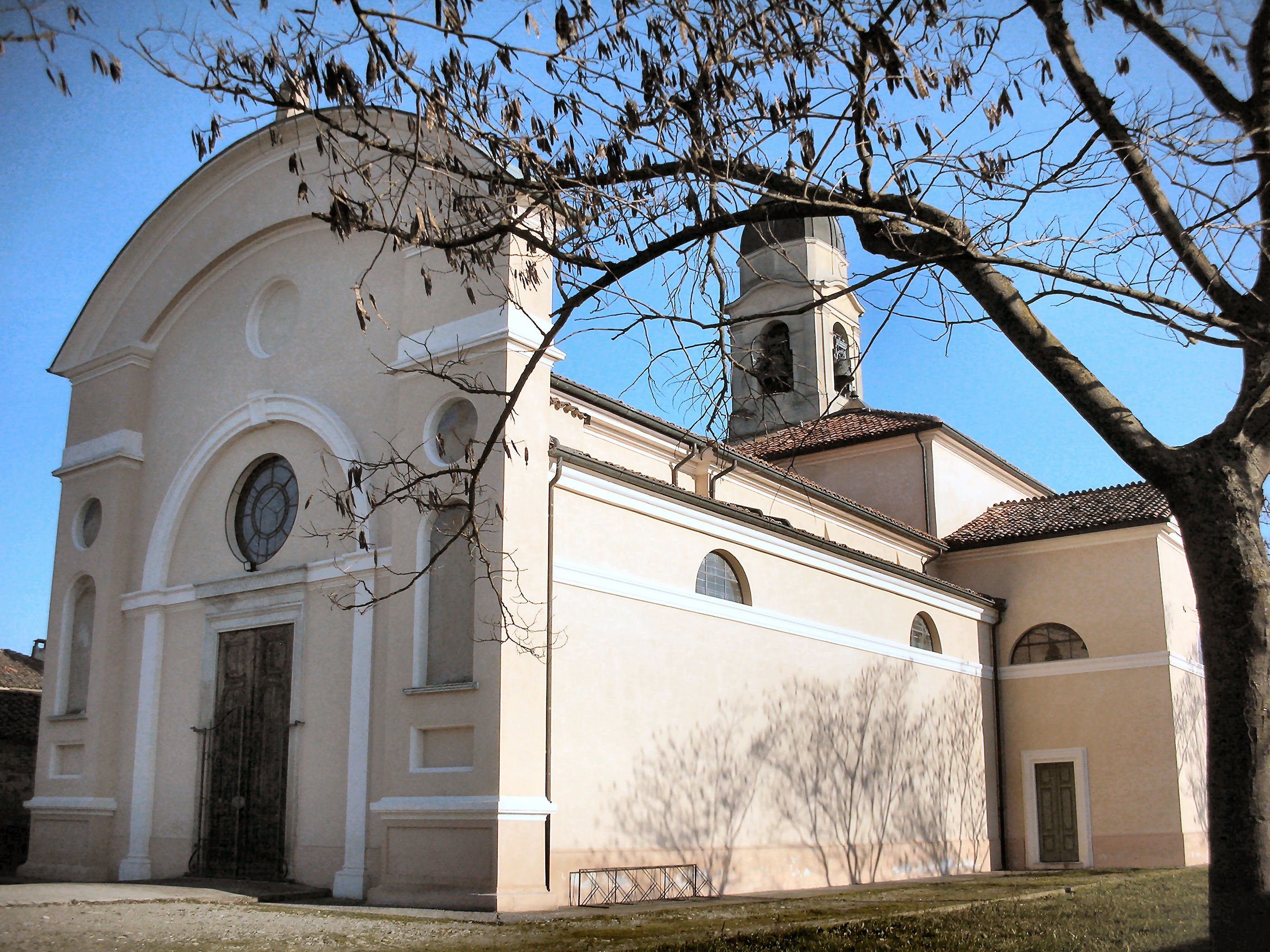 Chiesa Parrocchiale di San Nicola